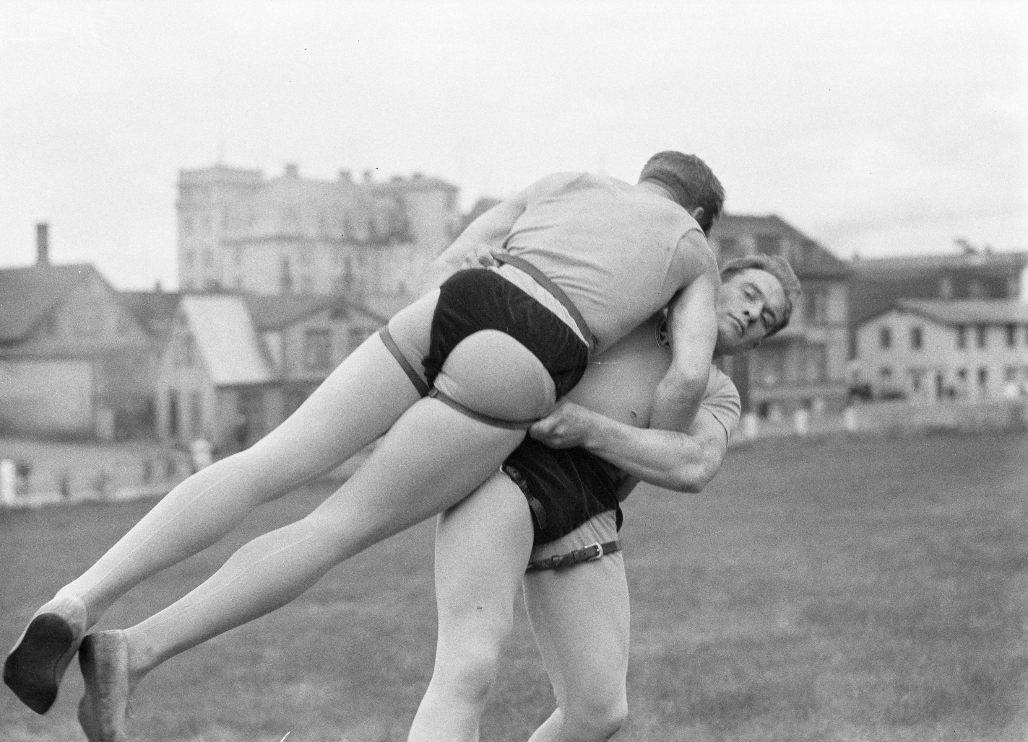 Collectie / Archief : Fotocollectie Van de Poll Reportage / Serie : IJsland Beschrijving : Reykjavik. IJslands worstelen (Glima). Twee leden van het glimateam van de Menntaskolinn in aktie Datum : 1934 Locatie : IJsland, Reykjavik Trefwoorden : sportverenigingen, uniformen, vecht- en verdedigingssporten, worstelen Fotograaf : Poll, Willem van de Auteursrechthebbende : Nationaal Archief Materiaalsoort : Glasnegatief Nummer archiefinventaris : bekijk toegang 2.24.14.02 Bestanddeelnummer : 190-0268